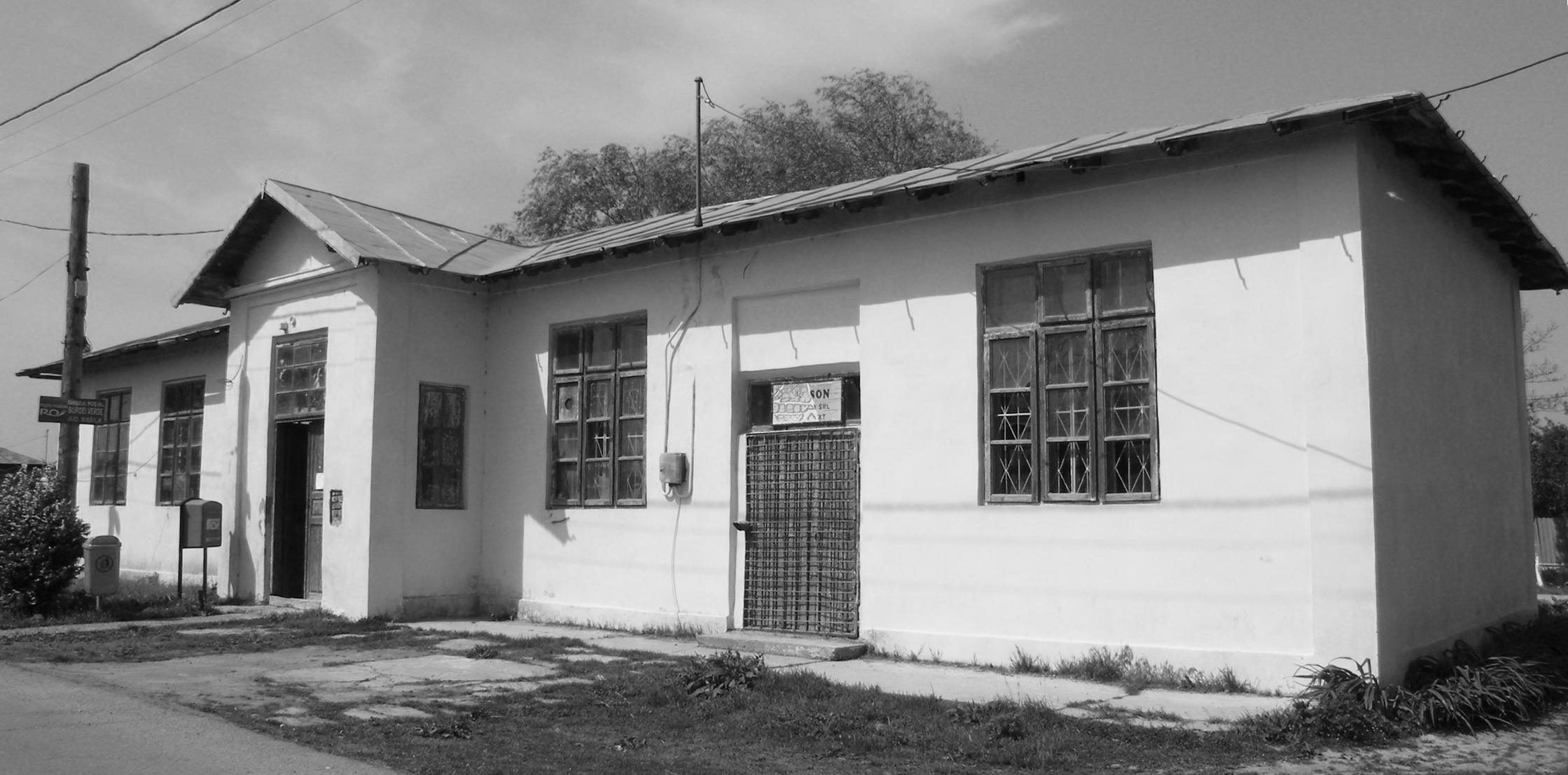 Fostul local al scolii din satul Bordei Verde - Scoala Veche